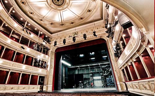 Blick auf die Bühne des Schauspielhaus Graz